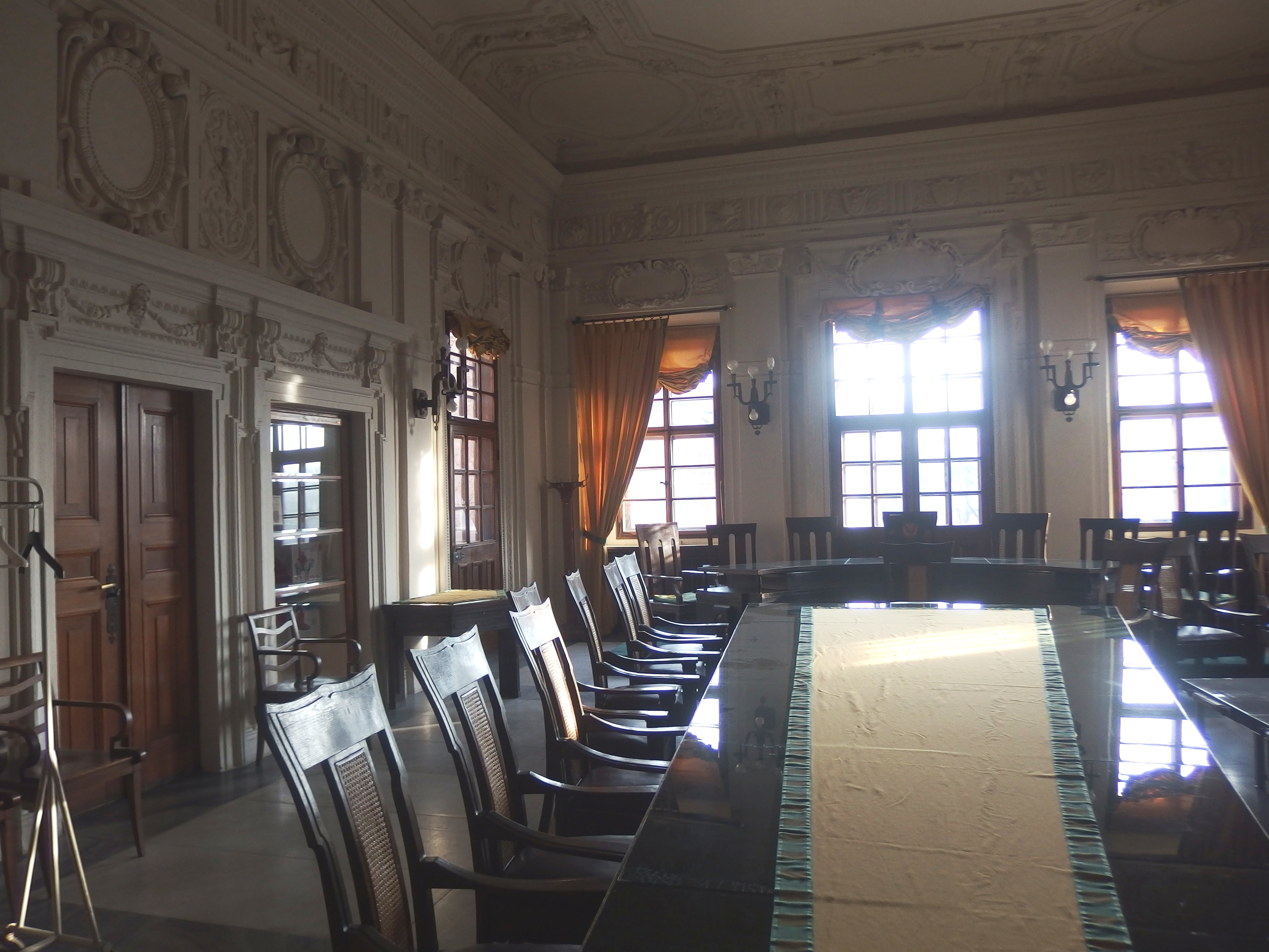 Michnovský palác, Újezd 450/40, Všehrdova 450/16, Praha 1, Malá Strana.